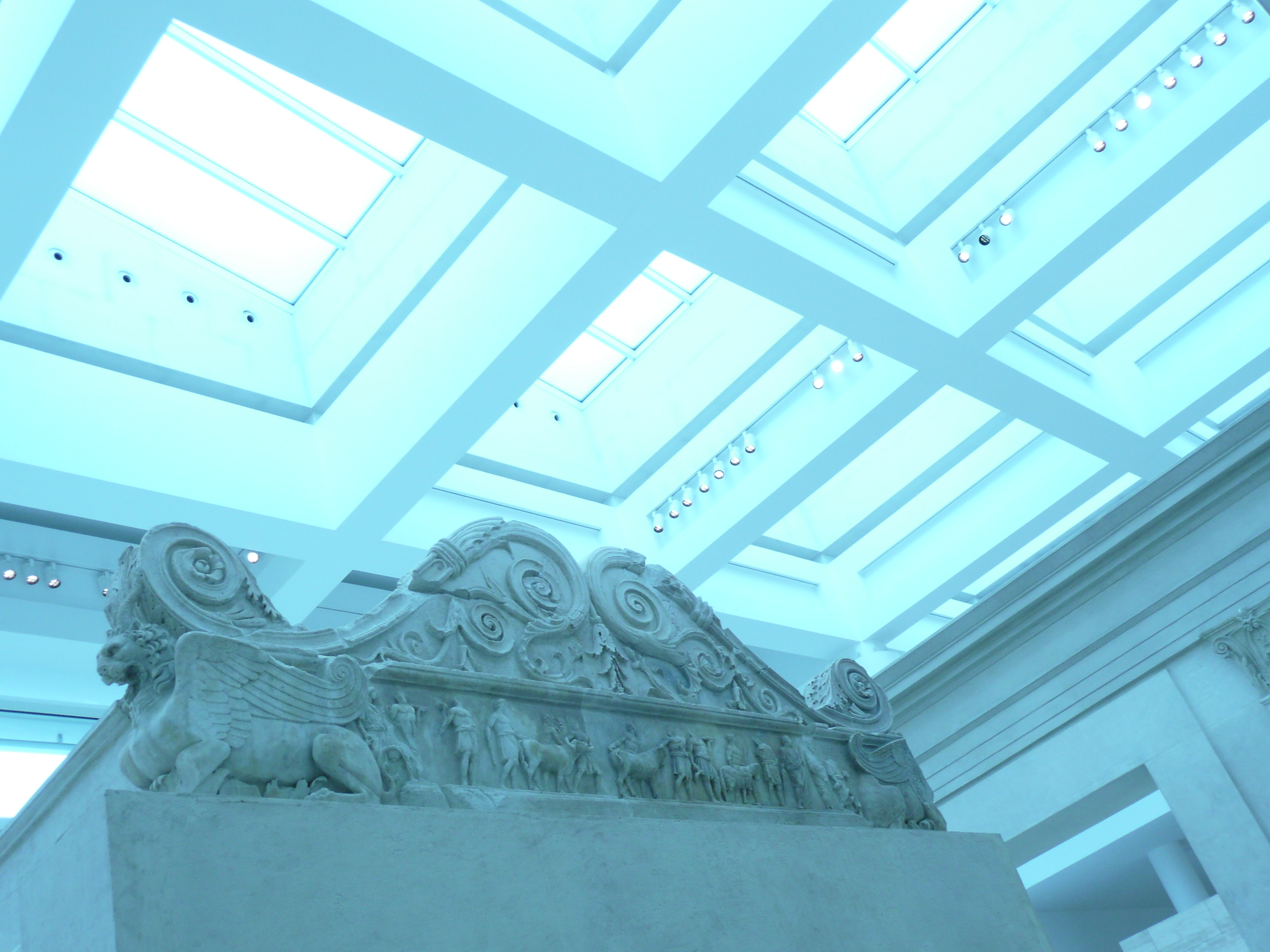 Ara pacis Augustae